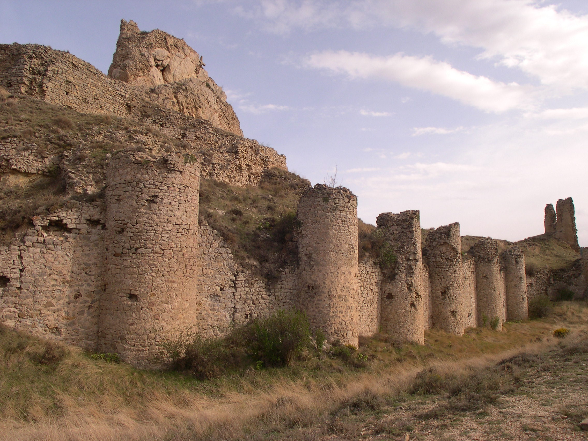 Aliaga, Teruel, Aragón, España/Spain, Castillo de la Encomienda (Orden de Santiago), muralla